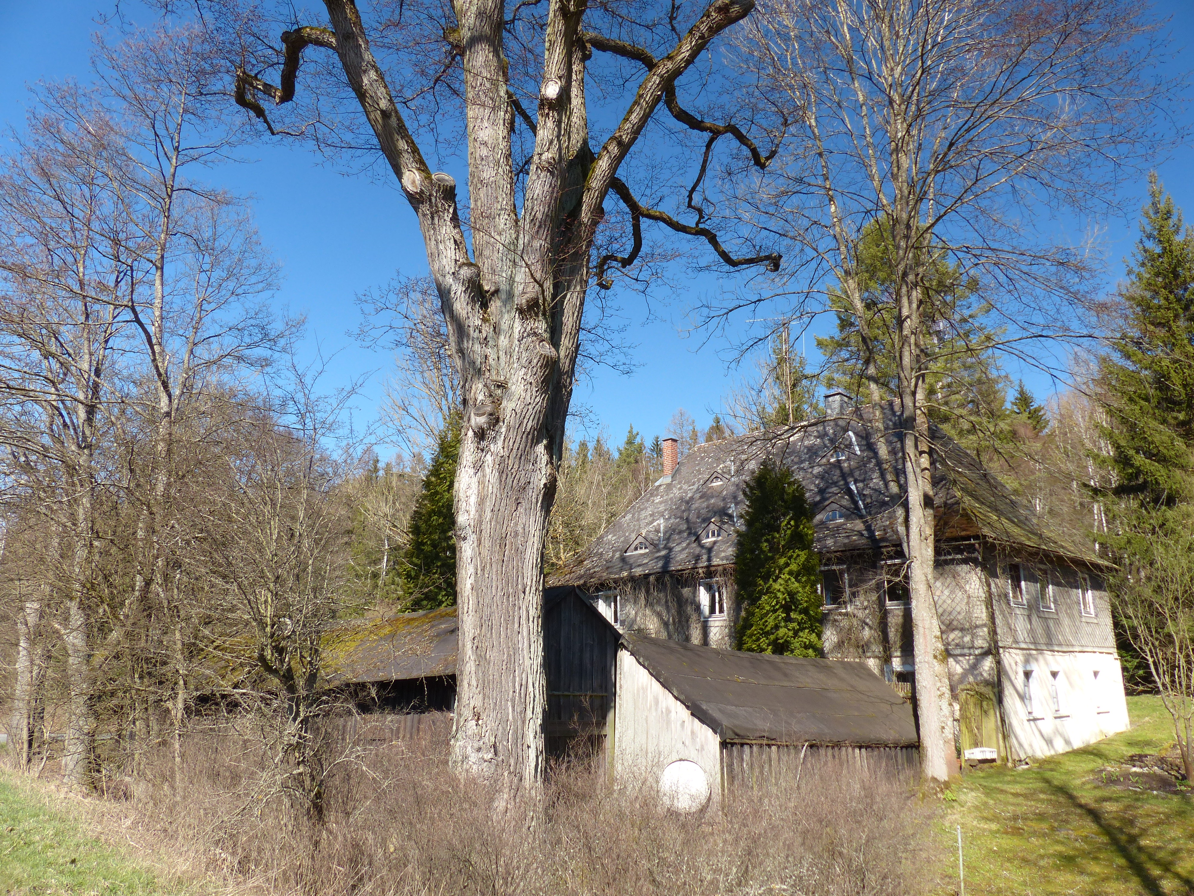 Bauwerke und Baudenkmäler in Schönwald